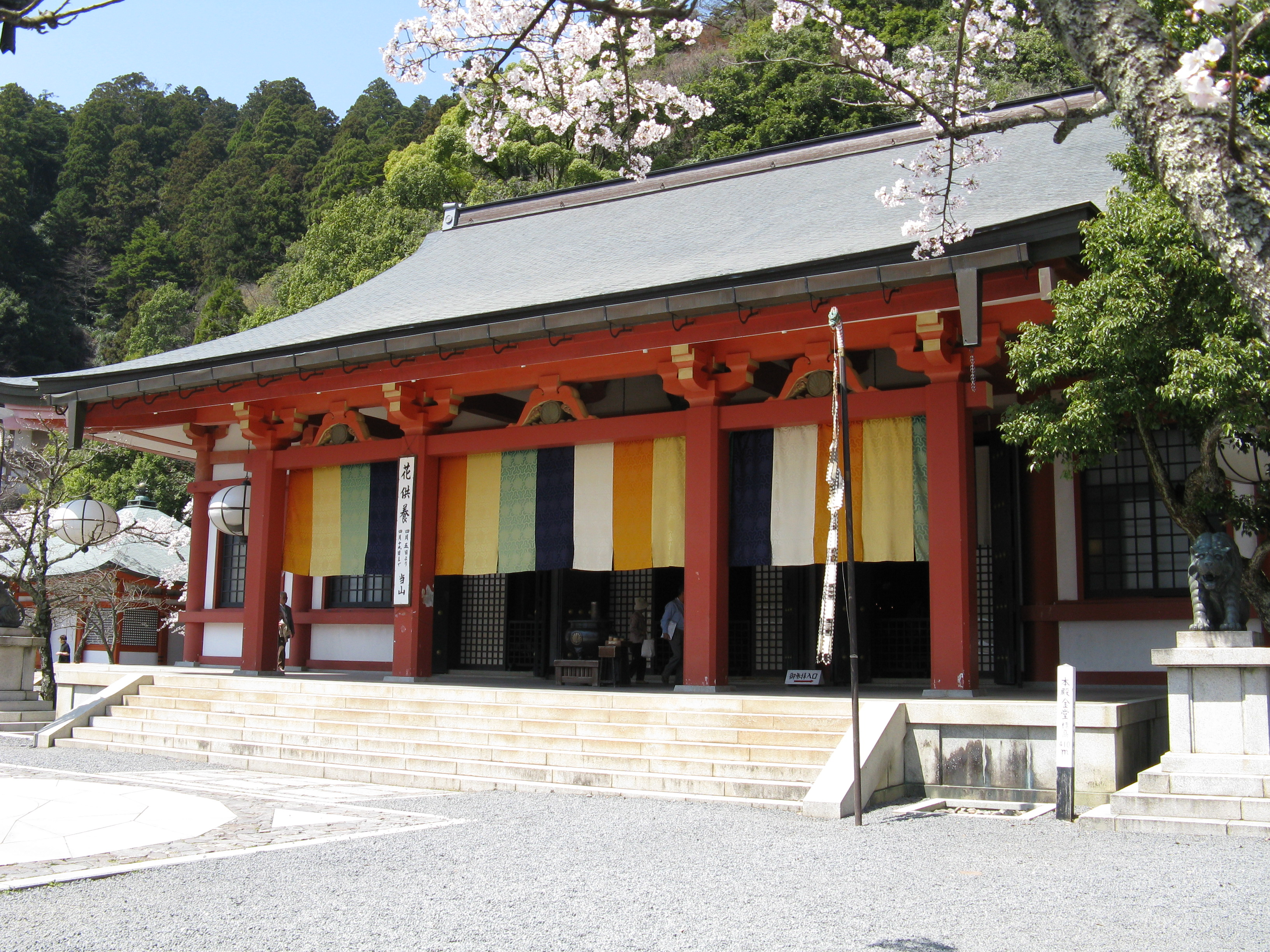 鞍馬寺 本殿金堂